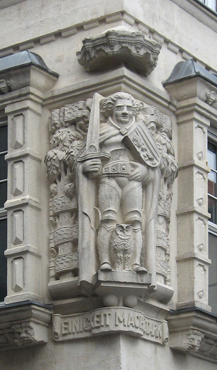 Messehaus Stentzlers Hof in Leipzig, erbaut 1914–1916: Roland mit Schwert und Leipziger Wappenschild an der Hausecke Petersstraße/Peterskirchhof (Bildhauer: Bruno Wollstätter), darunter ein Spruchband „Einigkeit macht stark“.